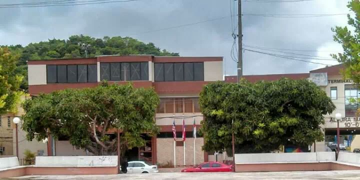 Florida Puerto Rico